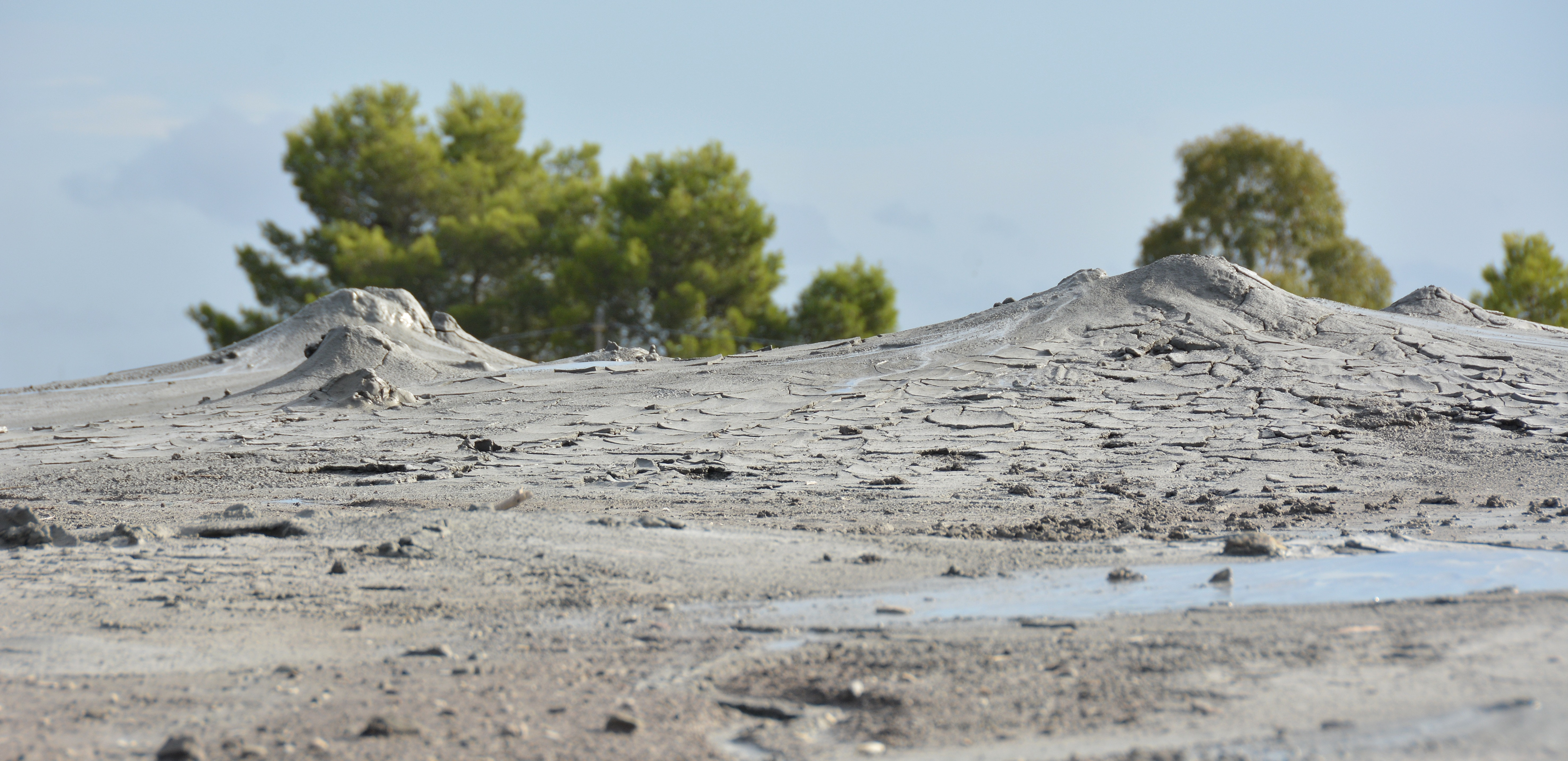 Caltanissetta